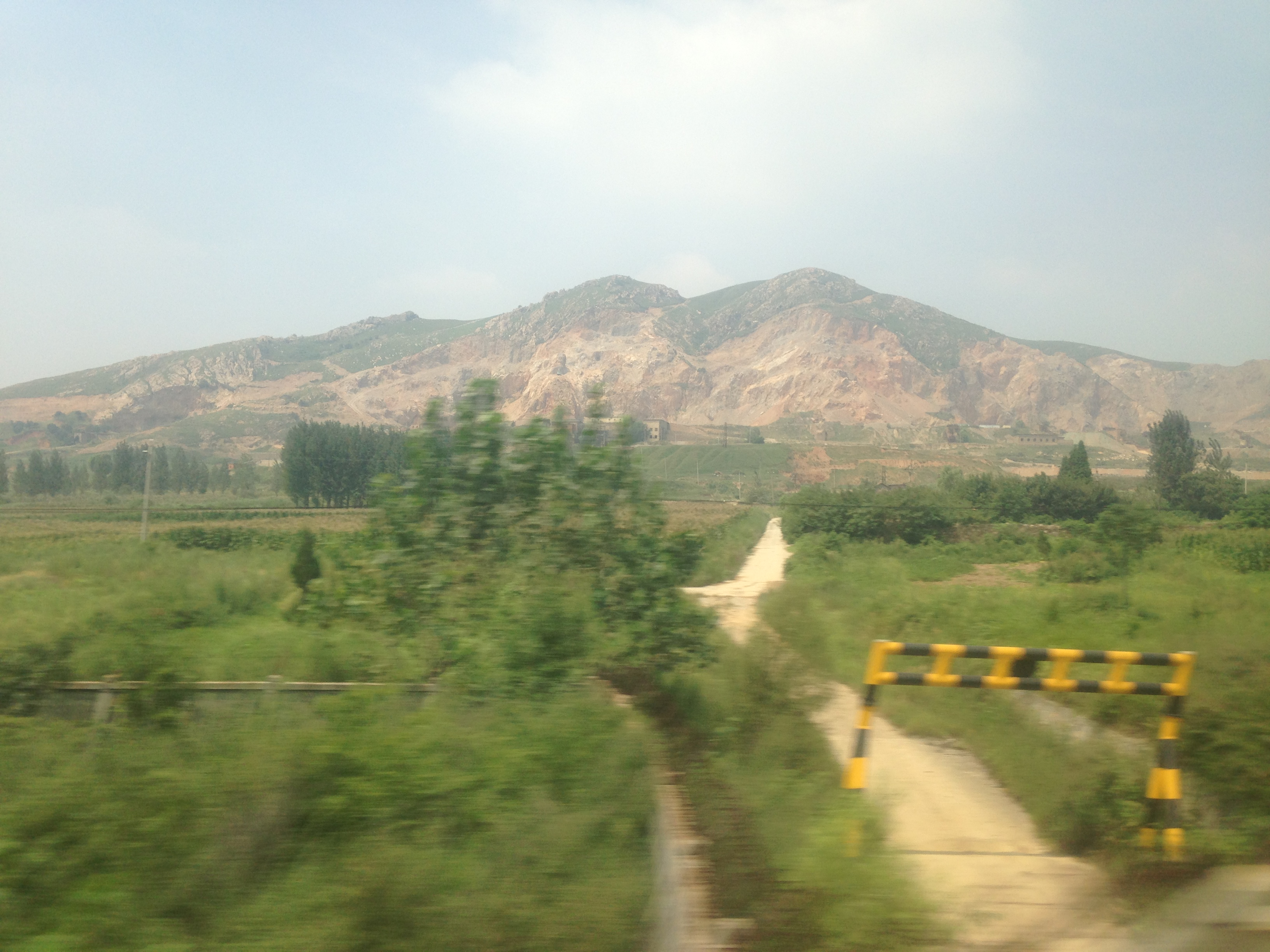 石武旅客専用線の列車内より望む駐馬店市確山県盤竜鎮付近の景色